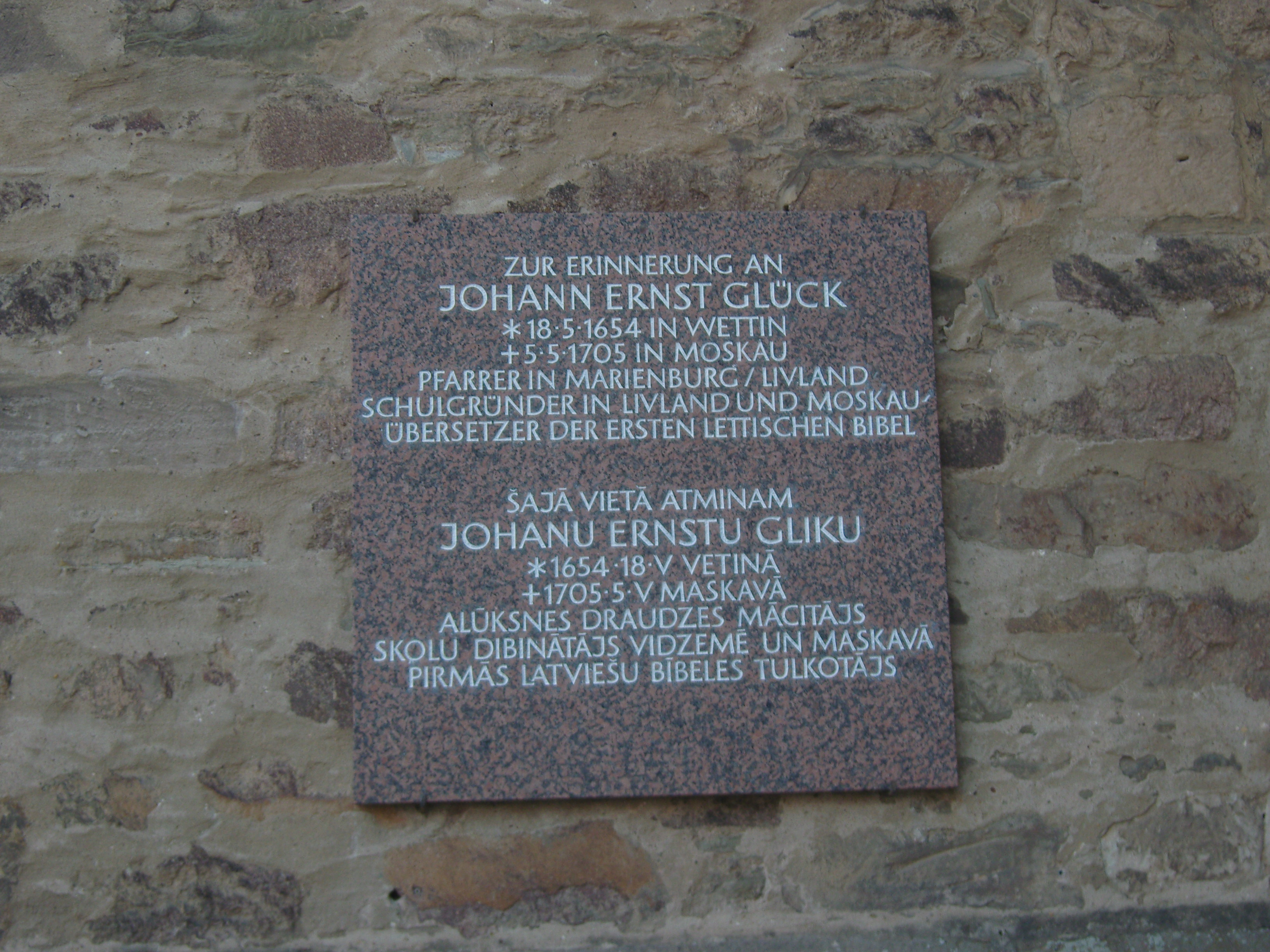 Gedenktafel an der Nikolaikirche in Wettin für Ernst Glück